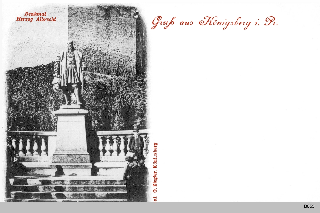 Herzog Albrecht Denkmal von Friedrich Reusch am Habertturm in KÖnigsberg